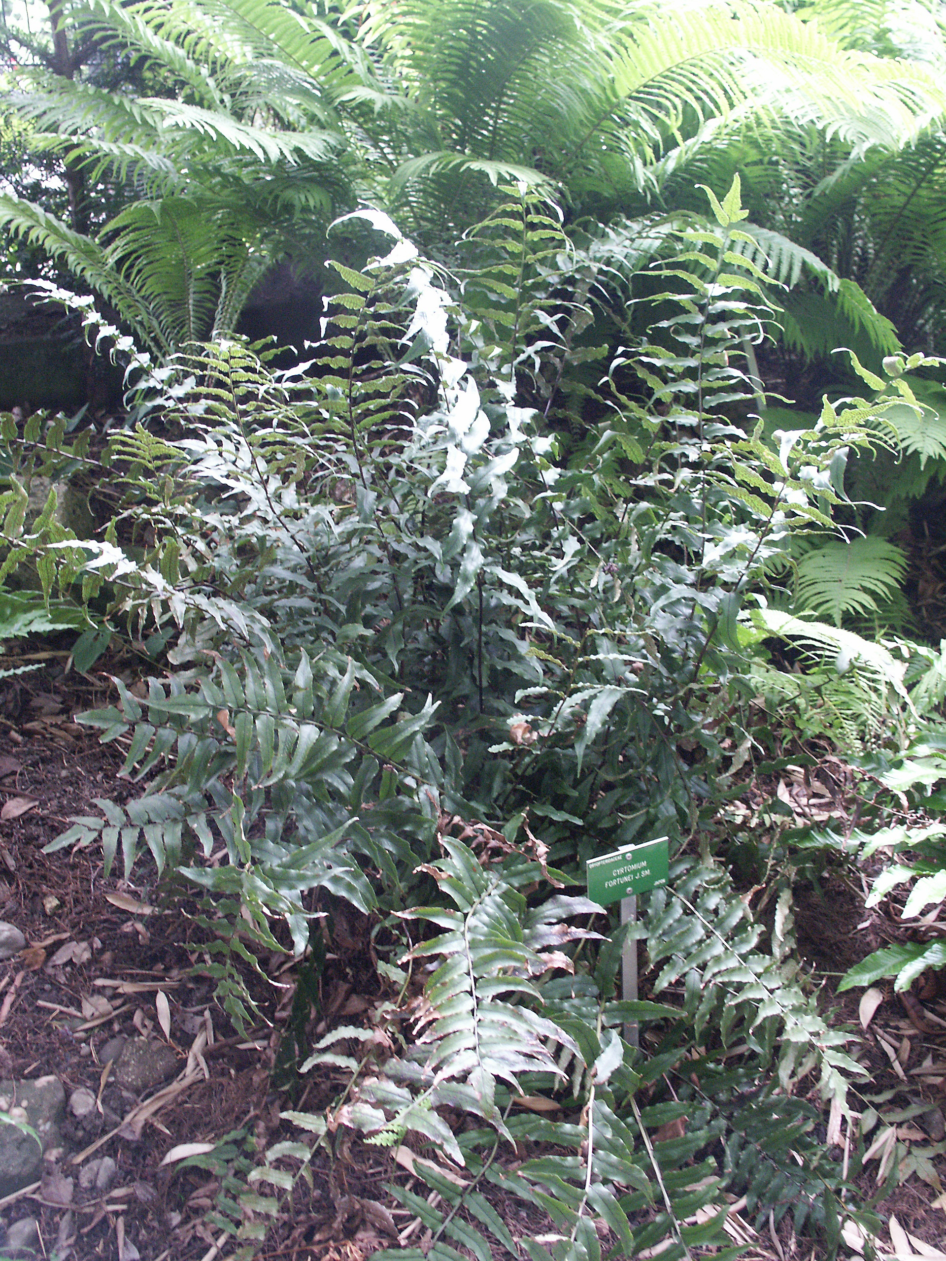 Cyrtomium fortunei - Jardin botanique de Strasbourg